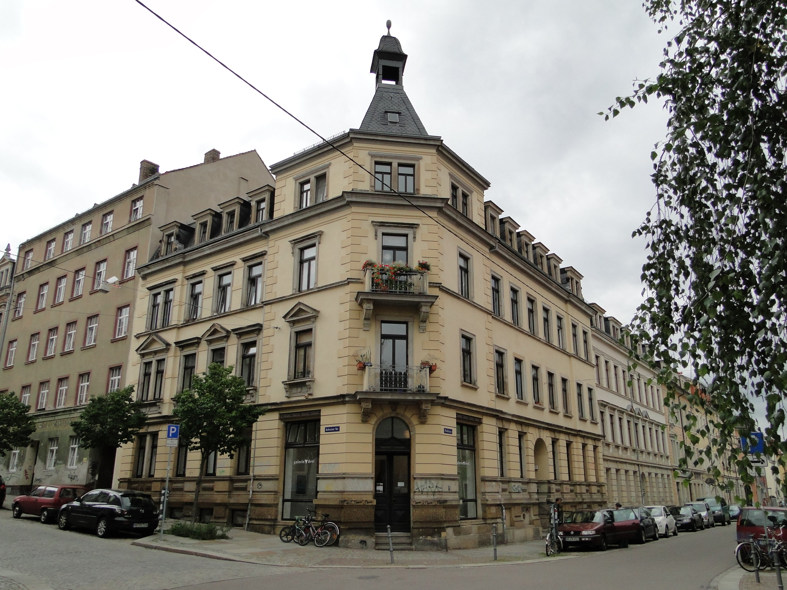 Kulturdenkmal Prießnitzstraße 43 Dresden